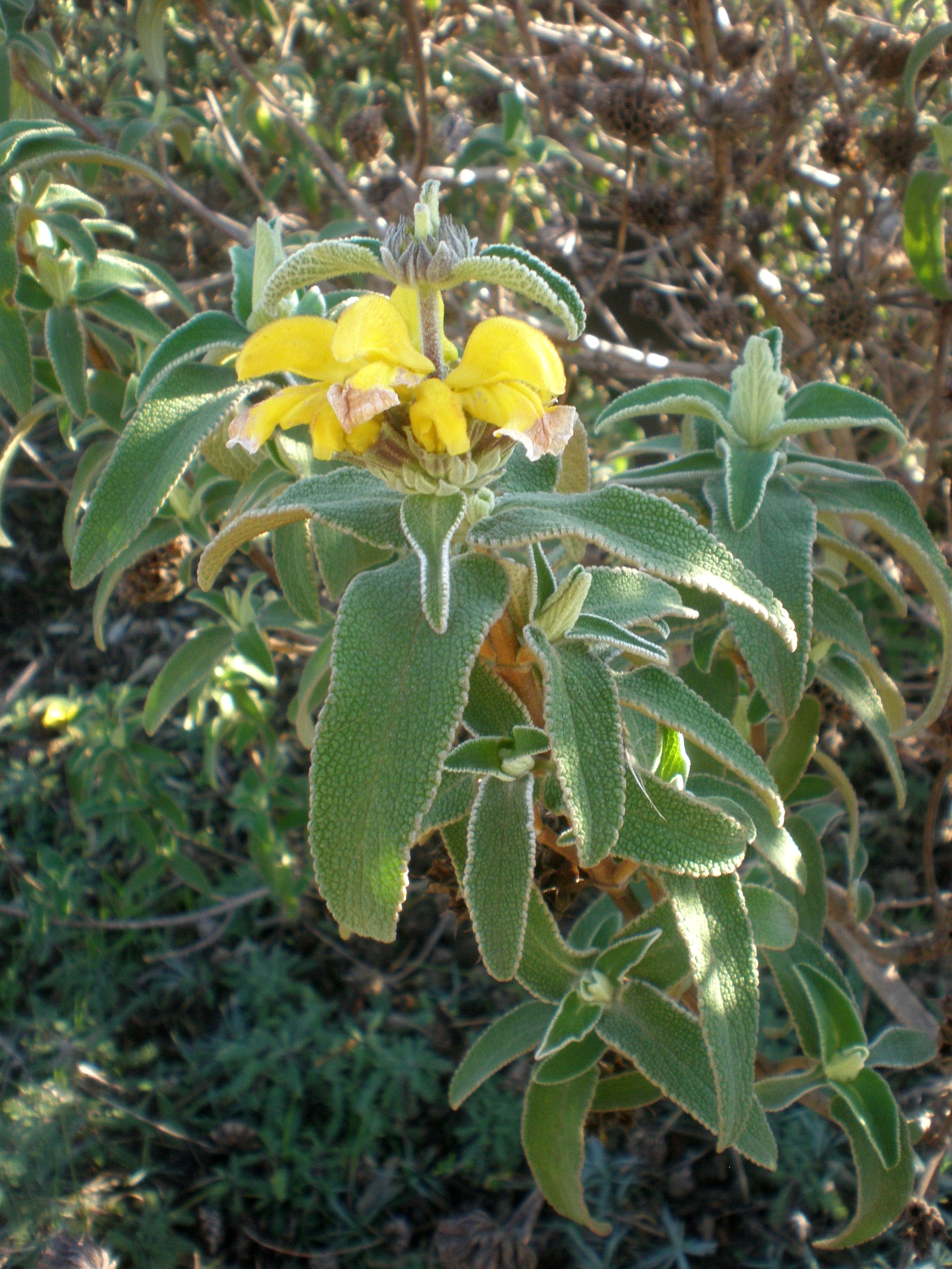 Jardín Botánico de Barcelona.